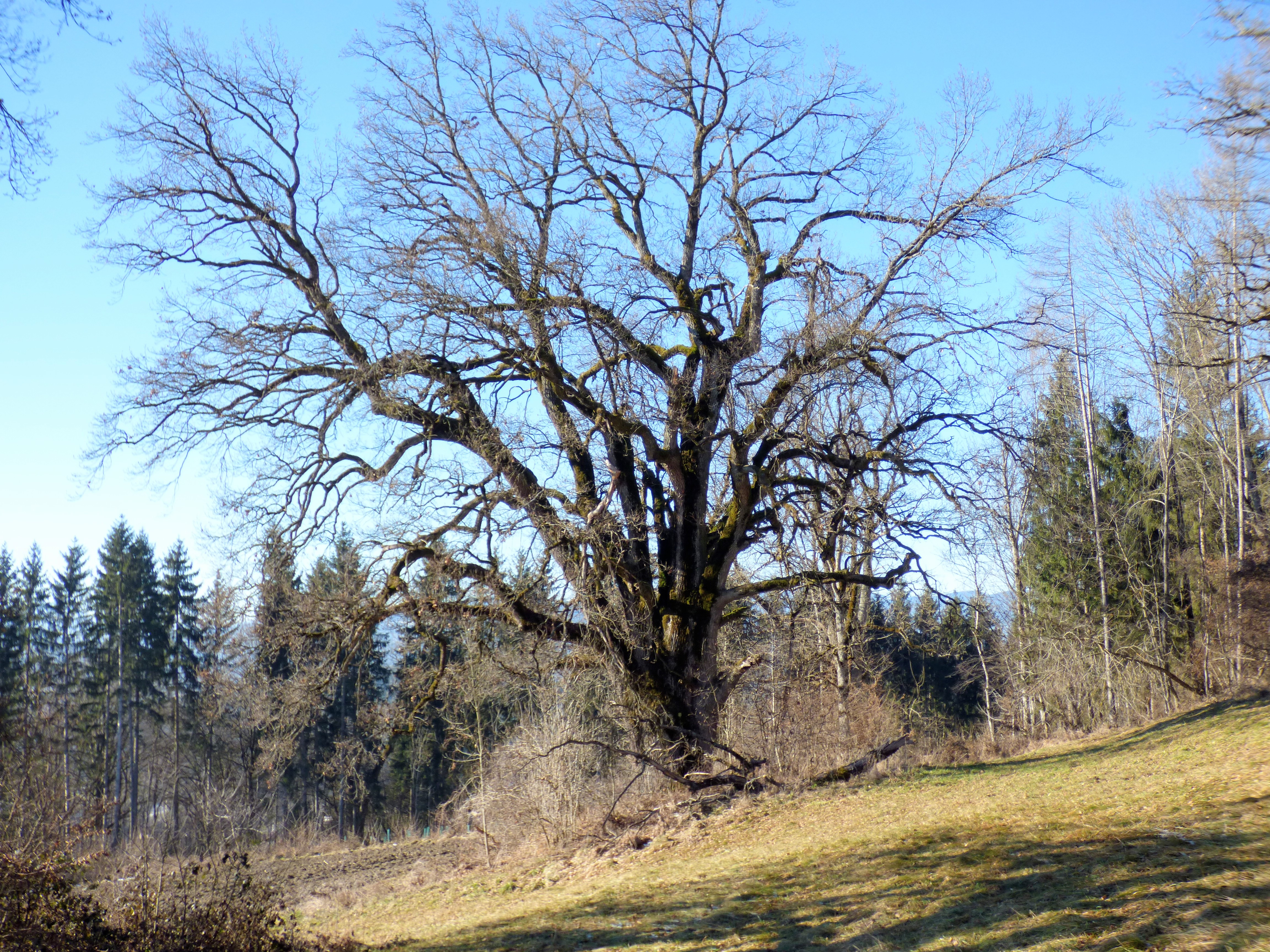 Stiel-Eiche in Tentschach, Klagenfurt This media shows the natural monument in Carinthia with the ID KS 28.